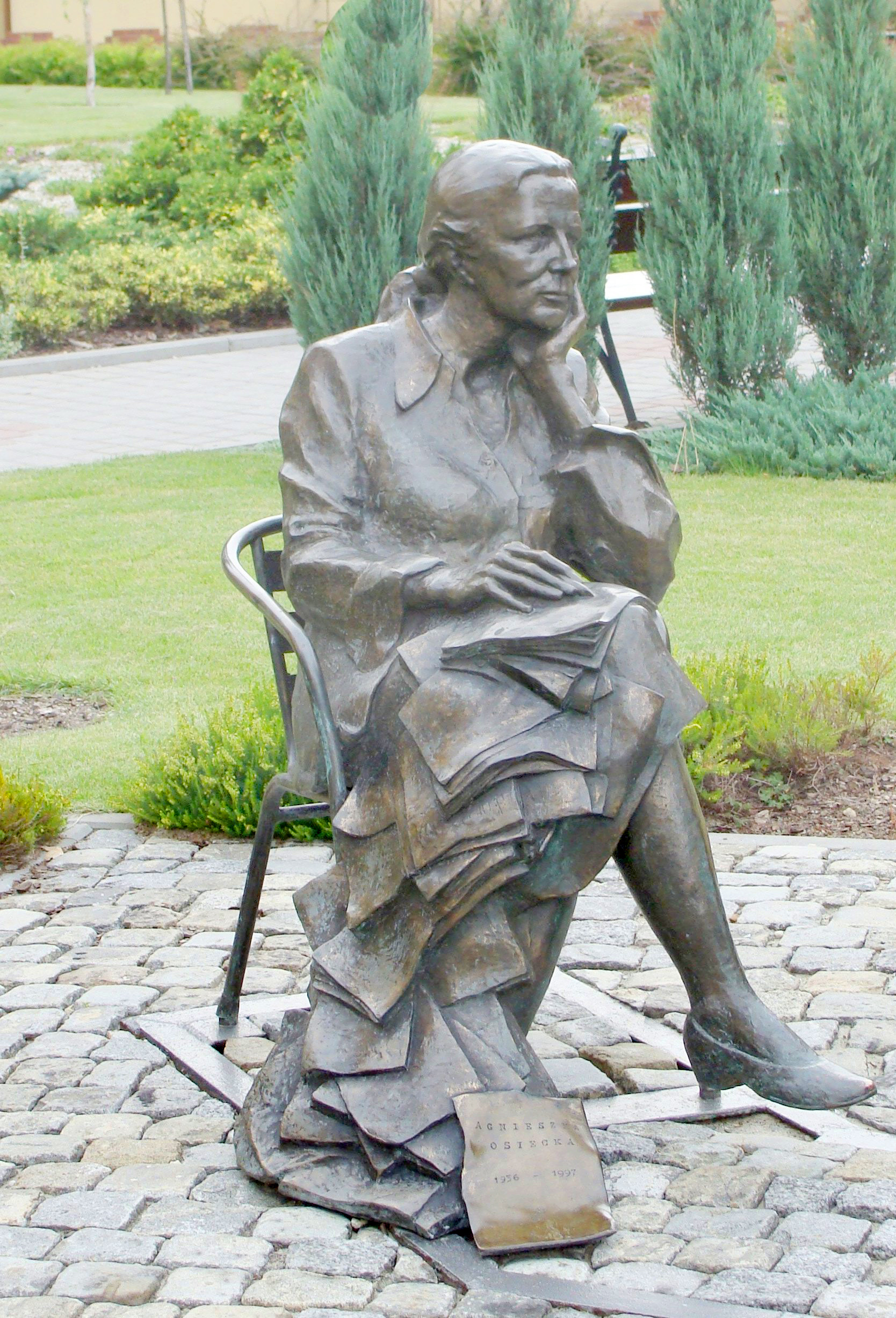 Pomnik Agnieszki Osieckiej obok Rektoratu UO w Opolu. Autor projektu: prof. Marian Molenda. Odlew: Wiktor Chalupczok.